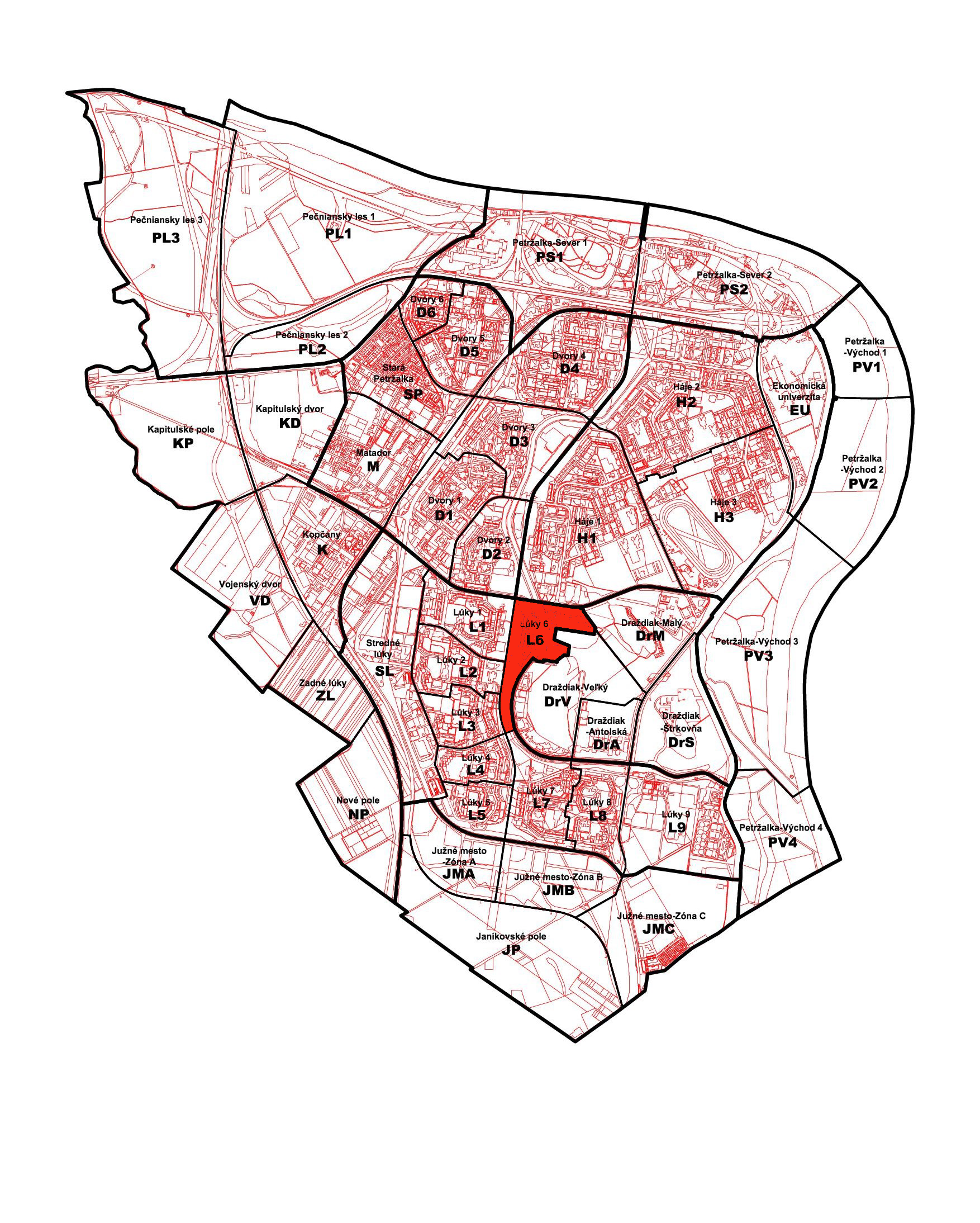 Poloha petržalskej miestnej časti